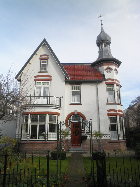 Villa ontworpen door J.R. Vlaming. Door asymmetrische opzet en detaillering heeft de bouwstijl wat weg van de Art Nouveau.